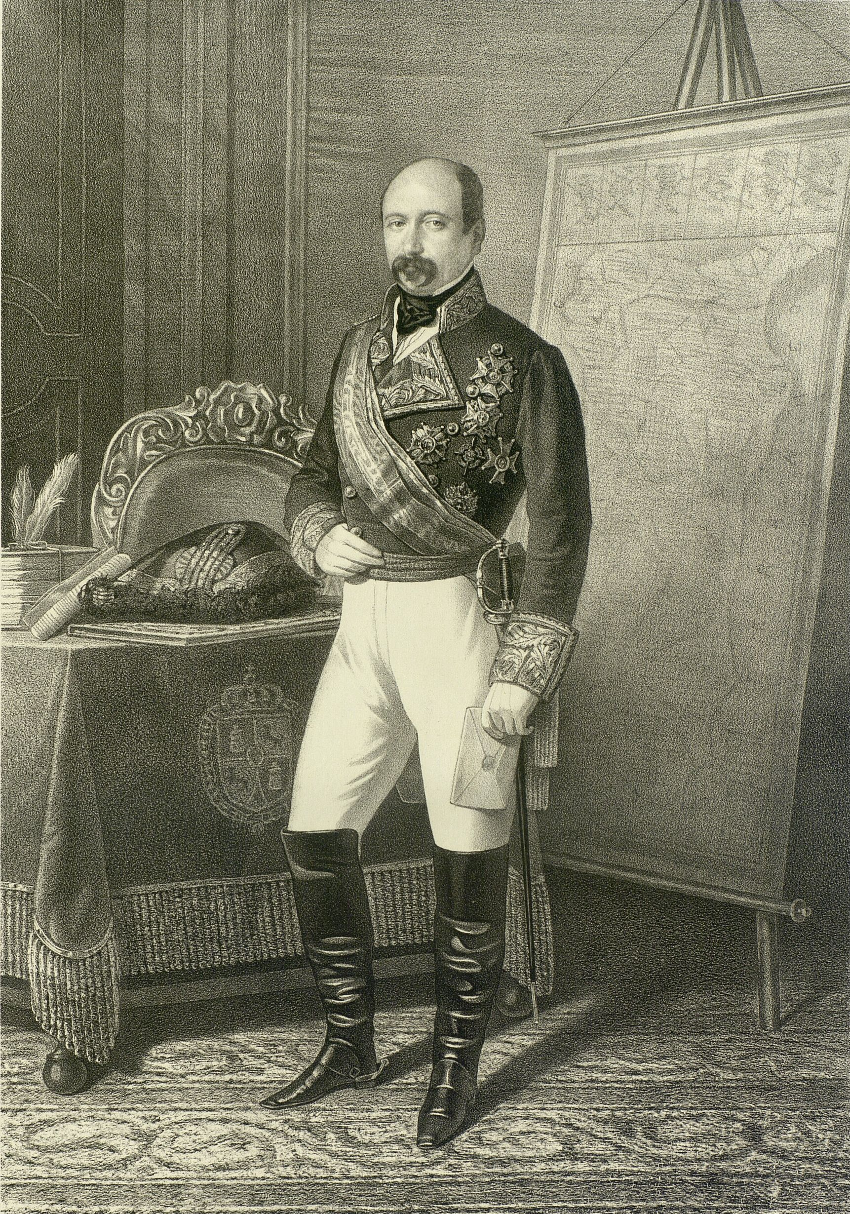 Anselmo Blaser.